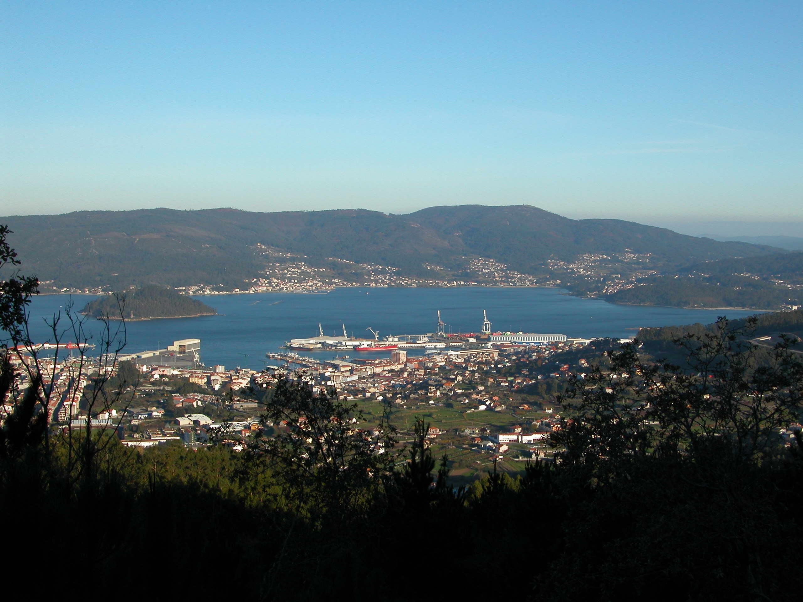 Vista xeral do Concello de Marín.